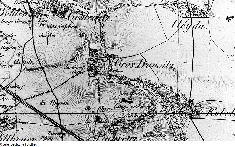 Original image description from the Deutsche Fotothek Hirschstein-Prausitz. Oberreit, Sect. Oschatz, 1839/40